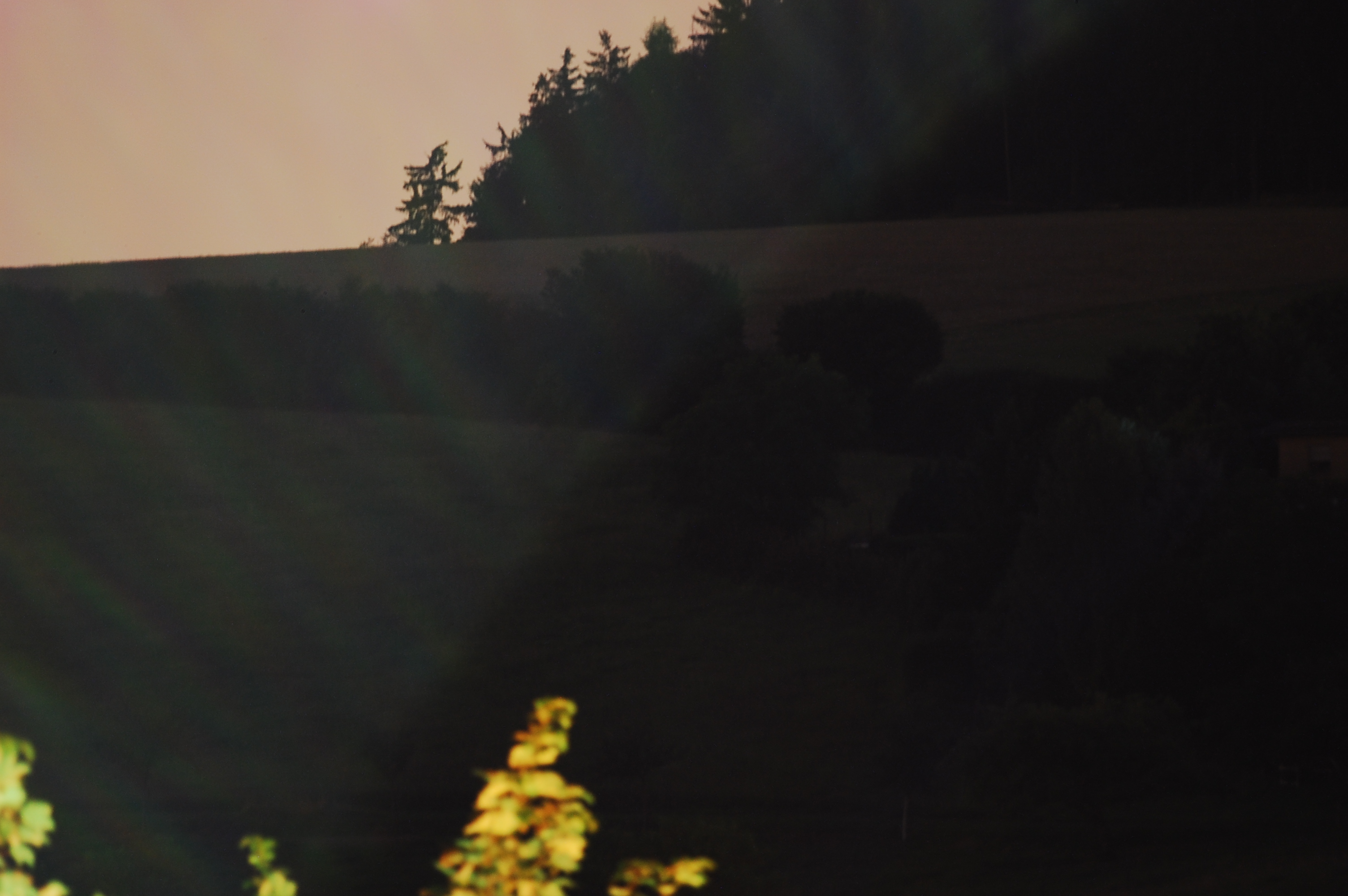 Bild mit erheblicher Beeinträchtigung durch Streulicht